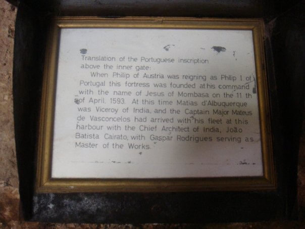 Traduction anglaise de l'inscription portugaise à l'entrée du fort Jesus de Mombasa